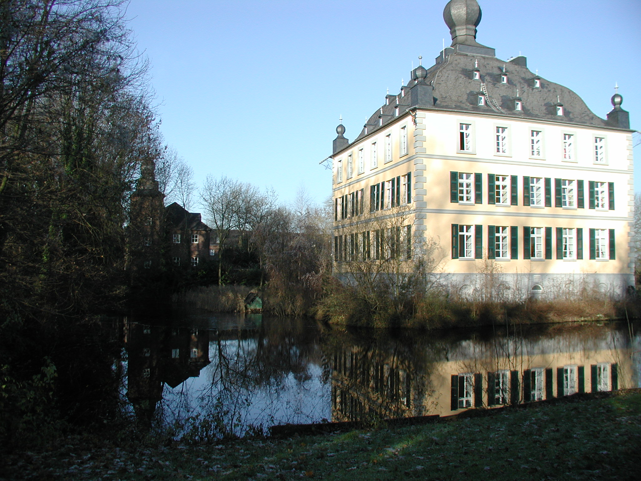 Burg Kendenich, Herrenhaus und Wassergraben